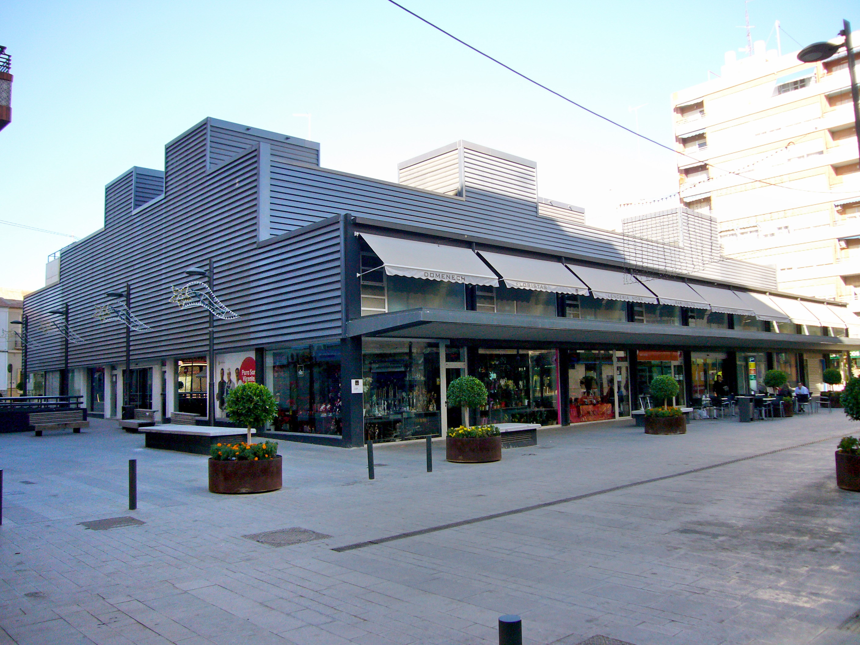 Nuevo Mercado Municipal de Abastos de San Vicente del Raspeig (Alicante).